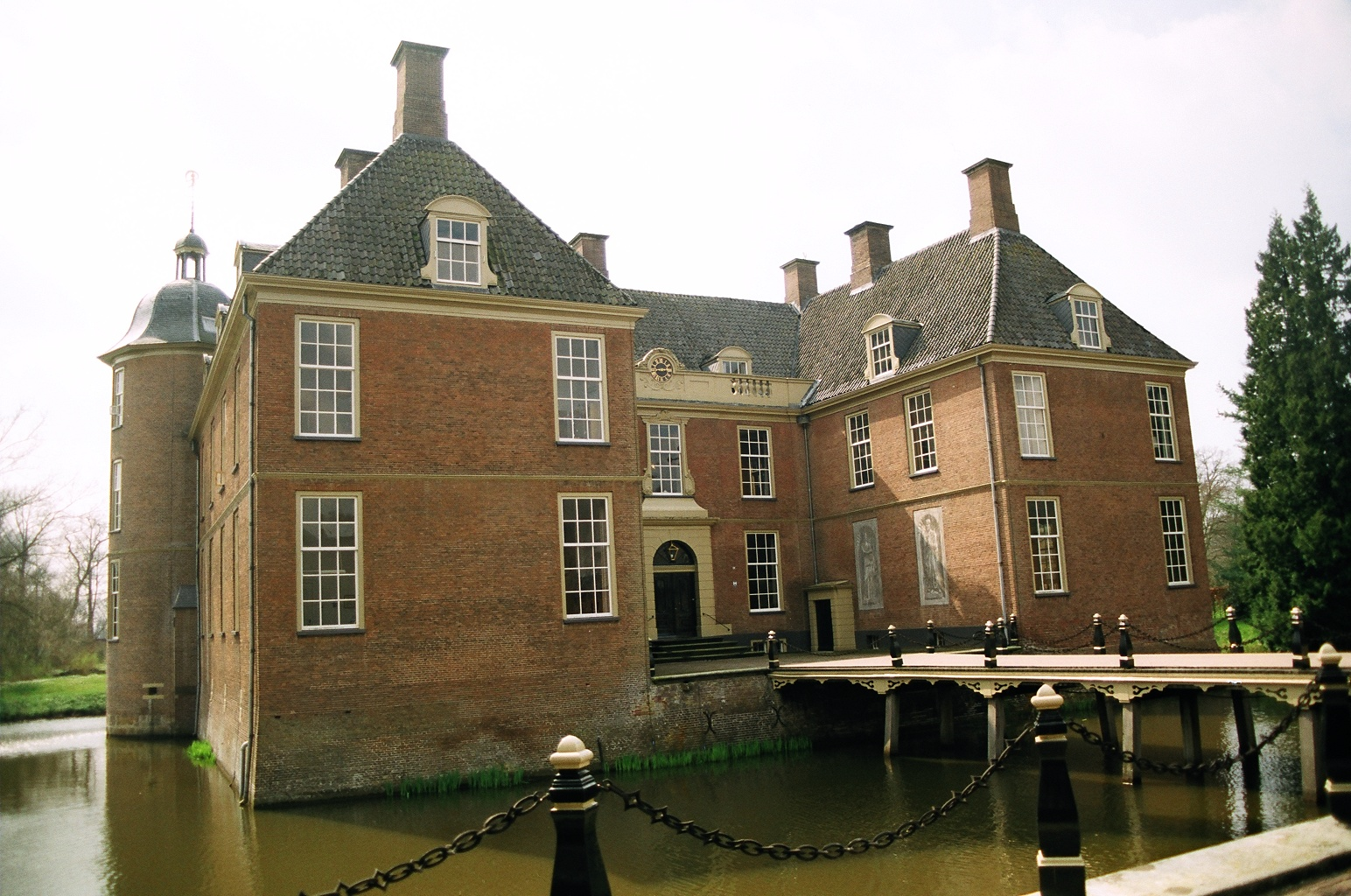 eigen werk